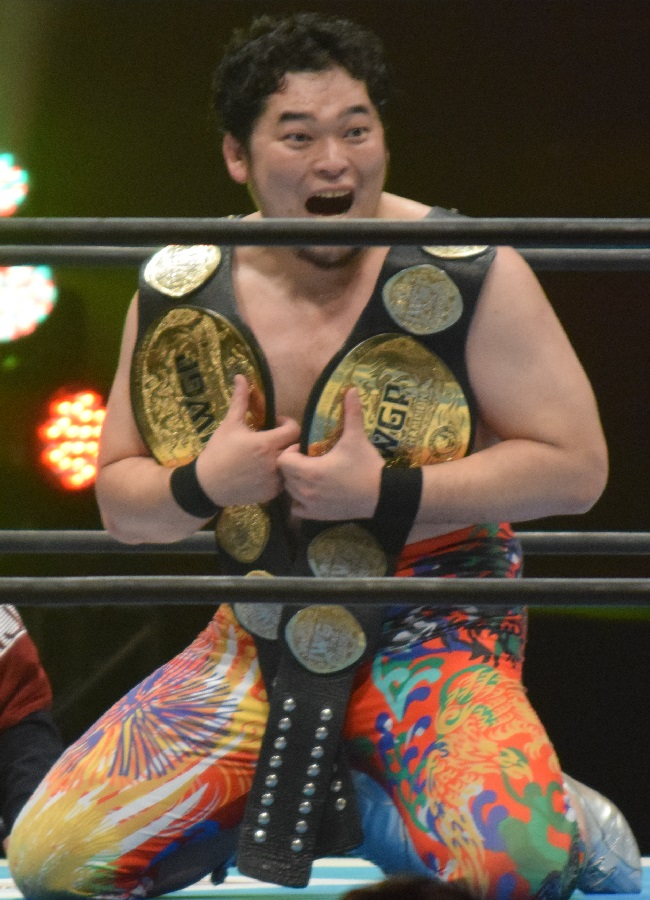 2017年2月11日 大阪府立体育会館 「THE NEW BEGINNING in OSAKA」 矢野通